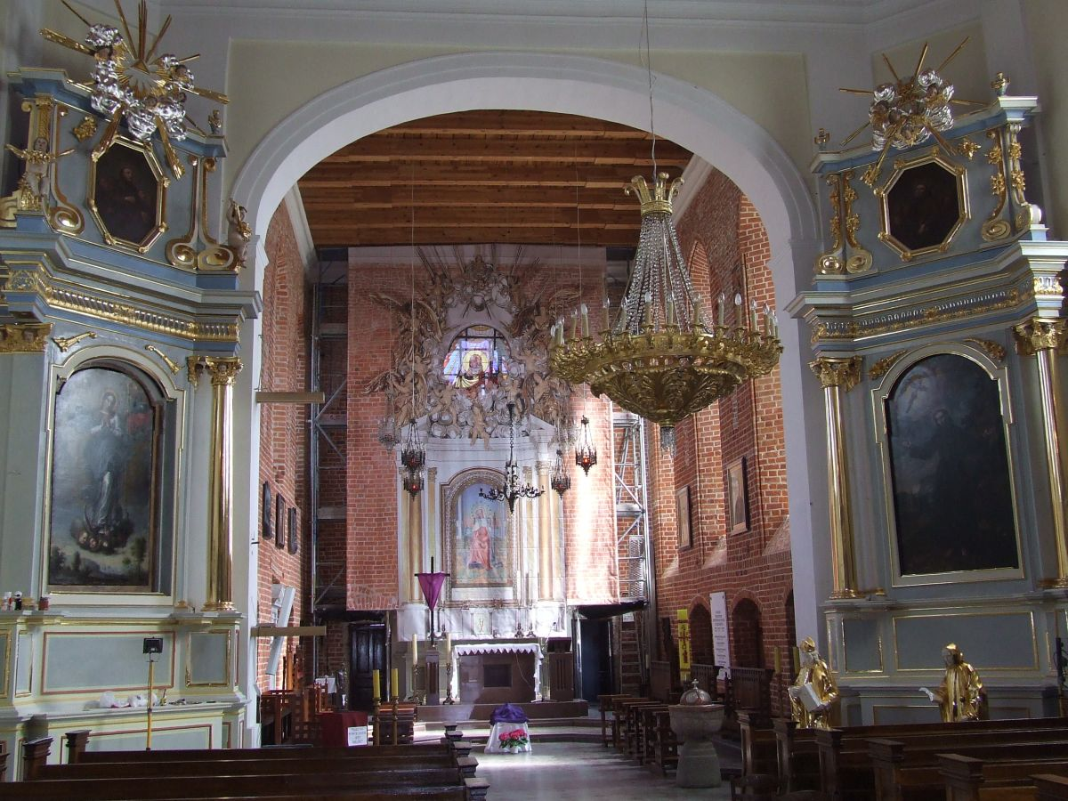 Kościół św. Katarzyny na Służewiu w Warszawie